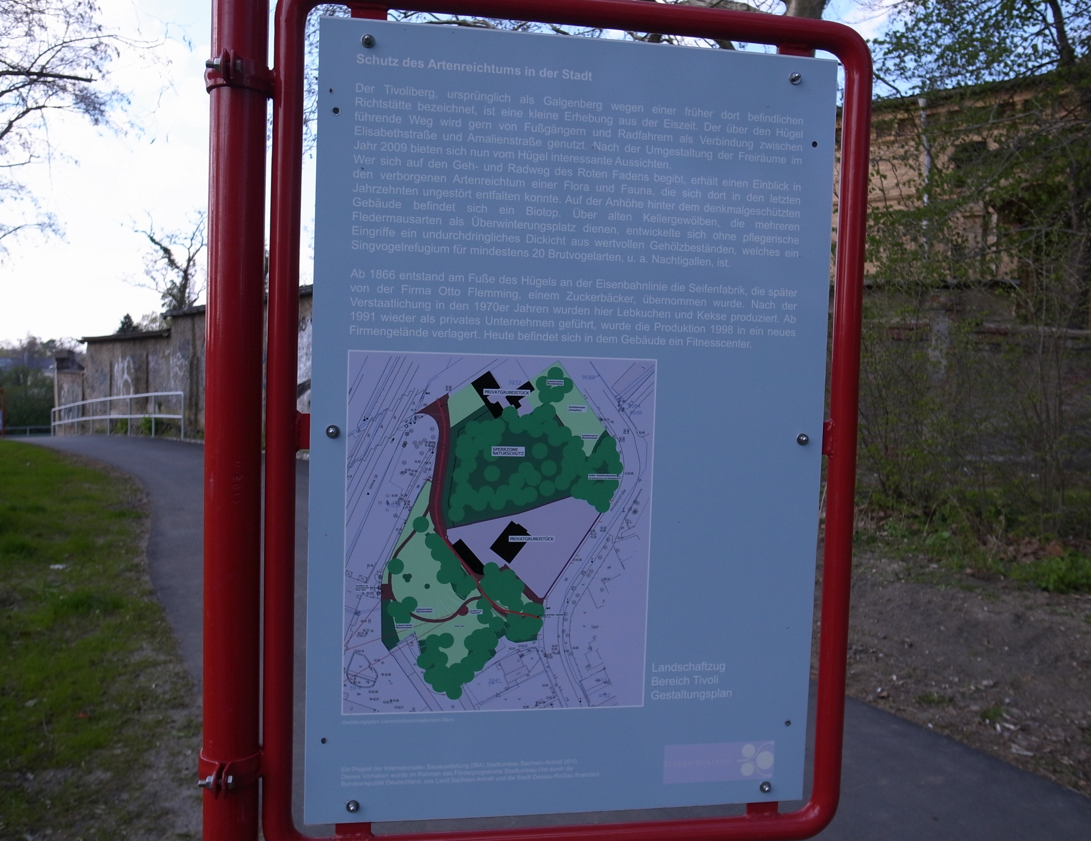 Informationstafel von der Stadt Dessau-Roßlau am Tivolihügel. Die Tafel ist inzwischen Opfer von Vandalismus geworden. Informationen zu der Infotafel und dem Projekt Roter Faden stehen auf der Homepage der Stadt Dessau-Roßlau[1].